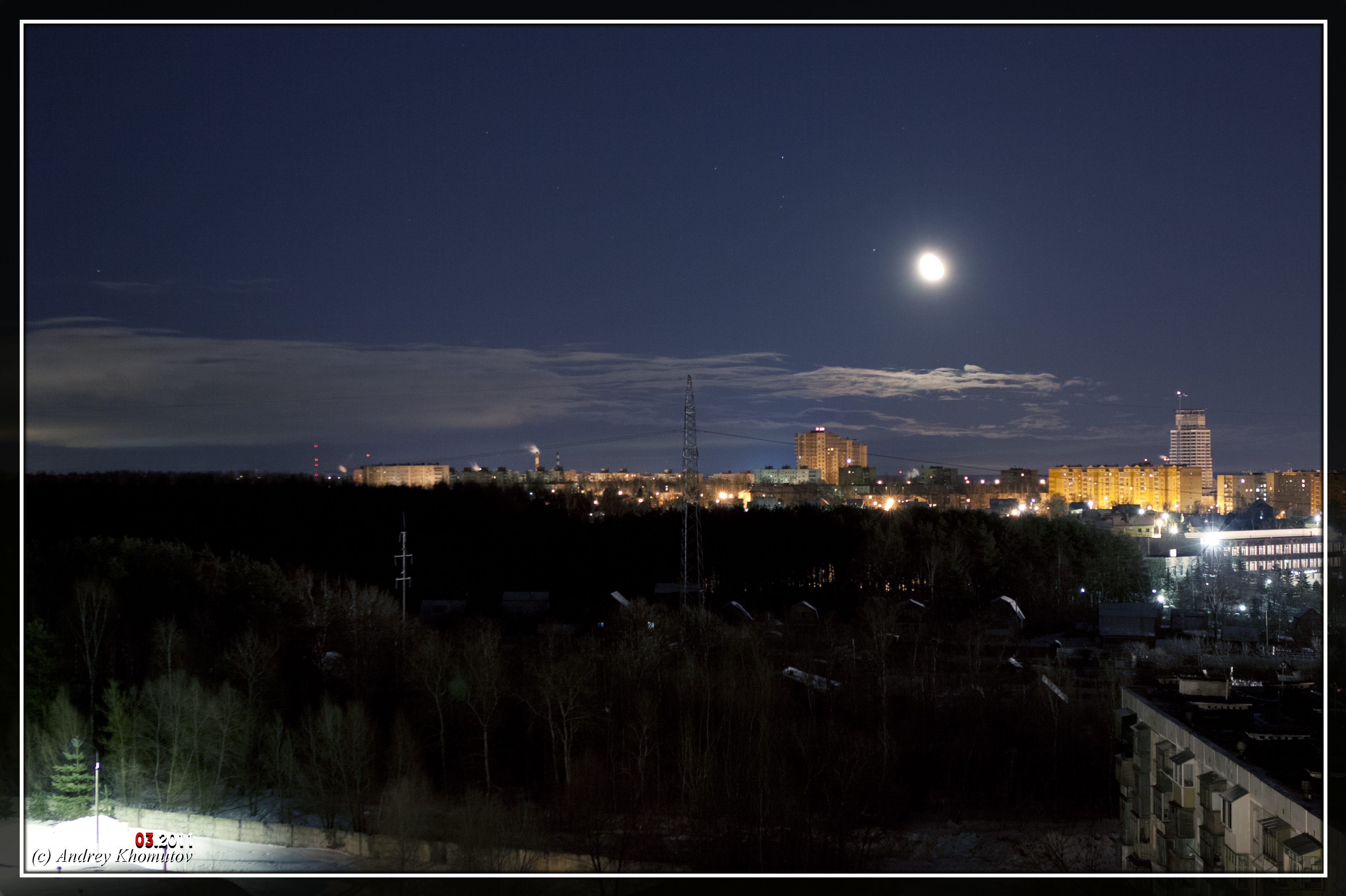 Ночной Щёлково